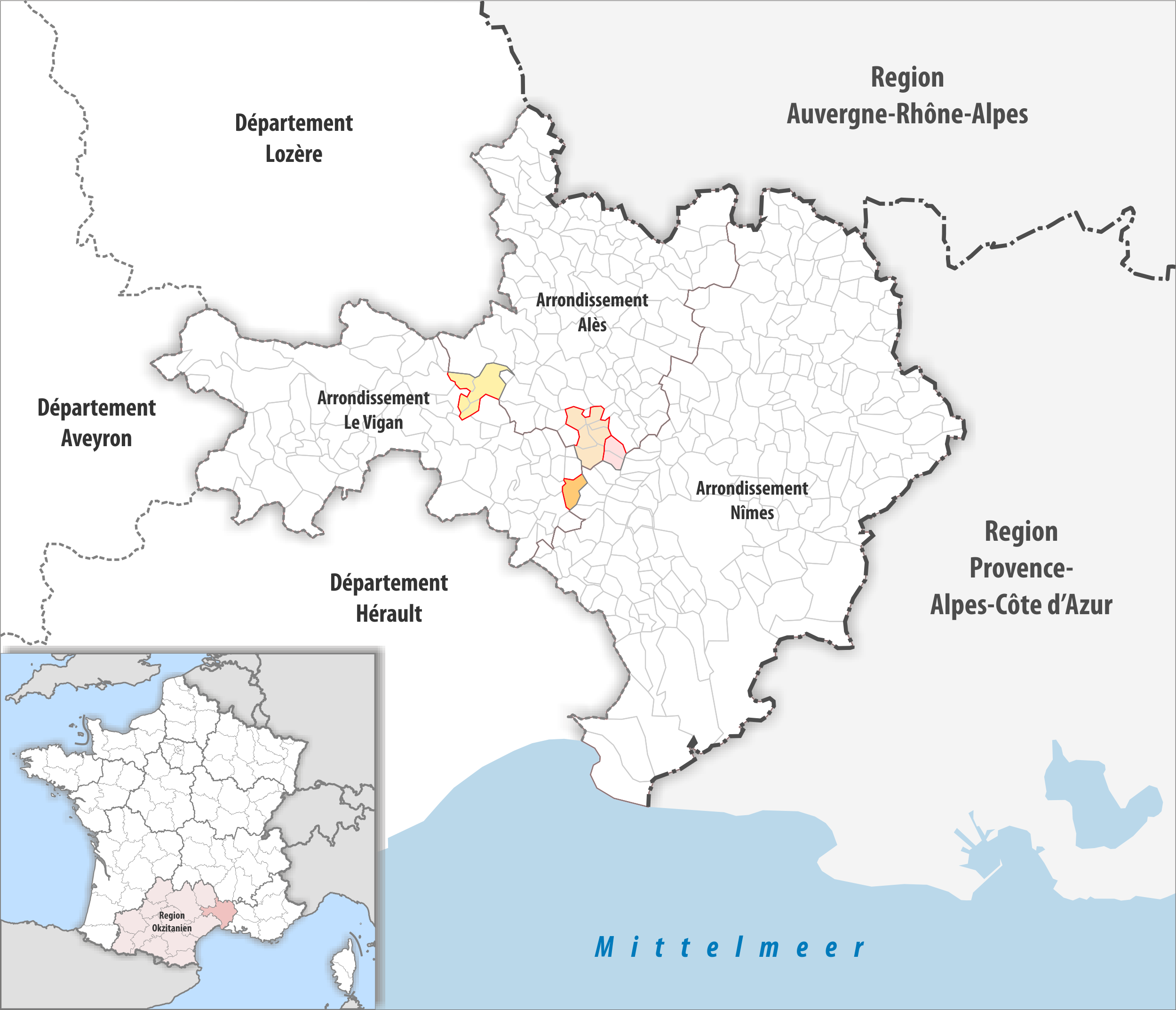 Arrondissements Anpassungen auf 2017 im Departement Gard